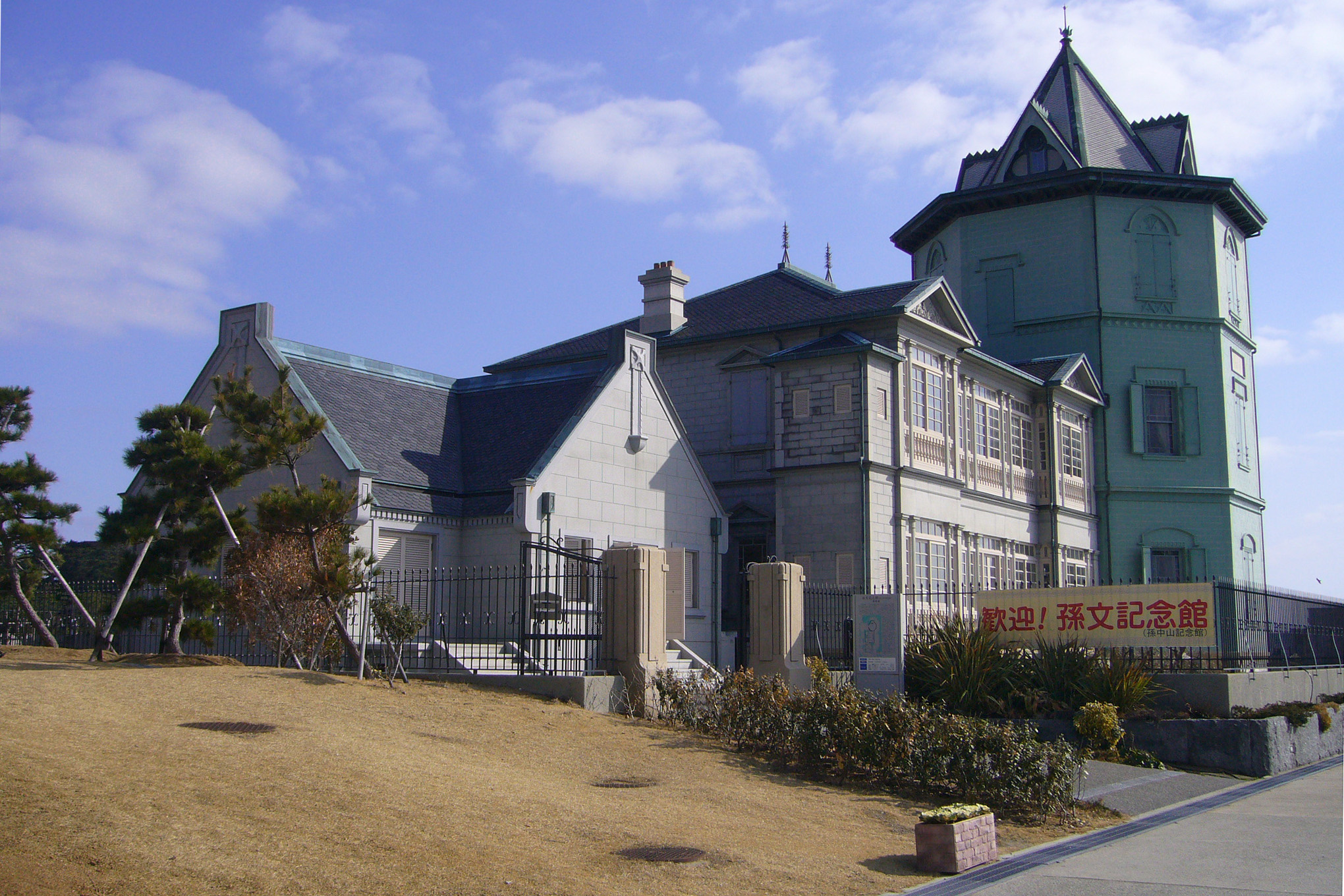 Ijokaku in Kobe, Hyogo prefecture, Japan